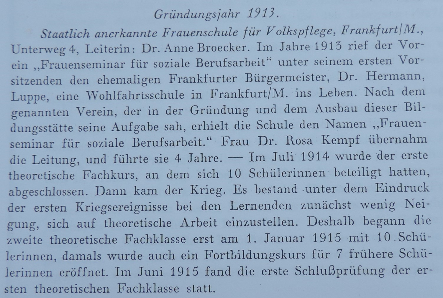 Frauenseminar für soziale Berufsarbeit